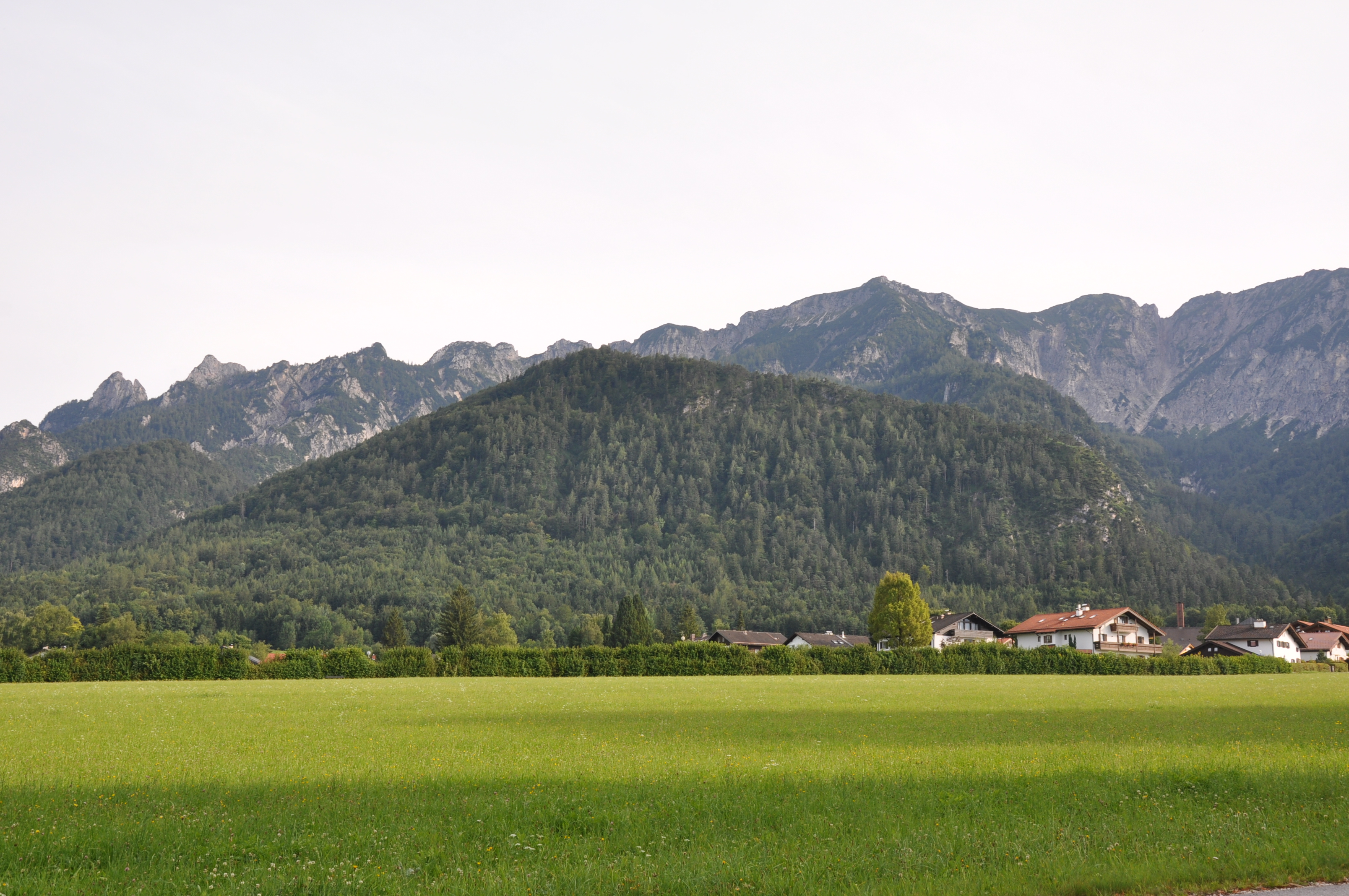 Die Hochplatte in Bayerisch Gmain. Im Hintergrund ein Teil des Lattengebirges.